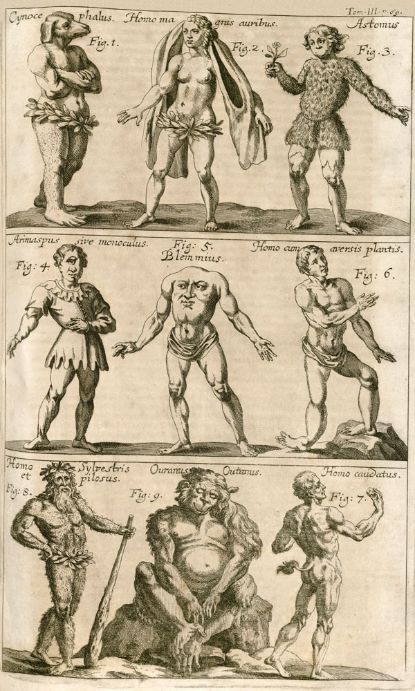 Kynokefal, panotti, astomi, kyklop, blemmya, abarimon, pygmé, orangutang og homo caudatus.